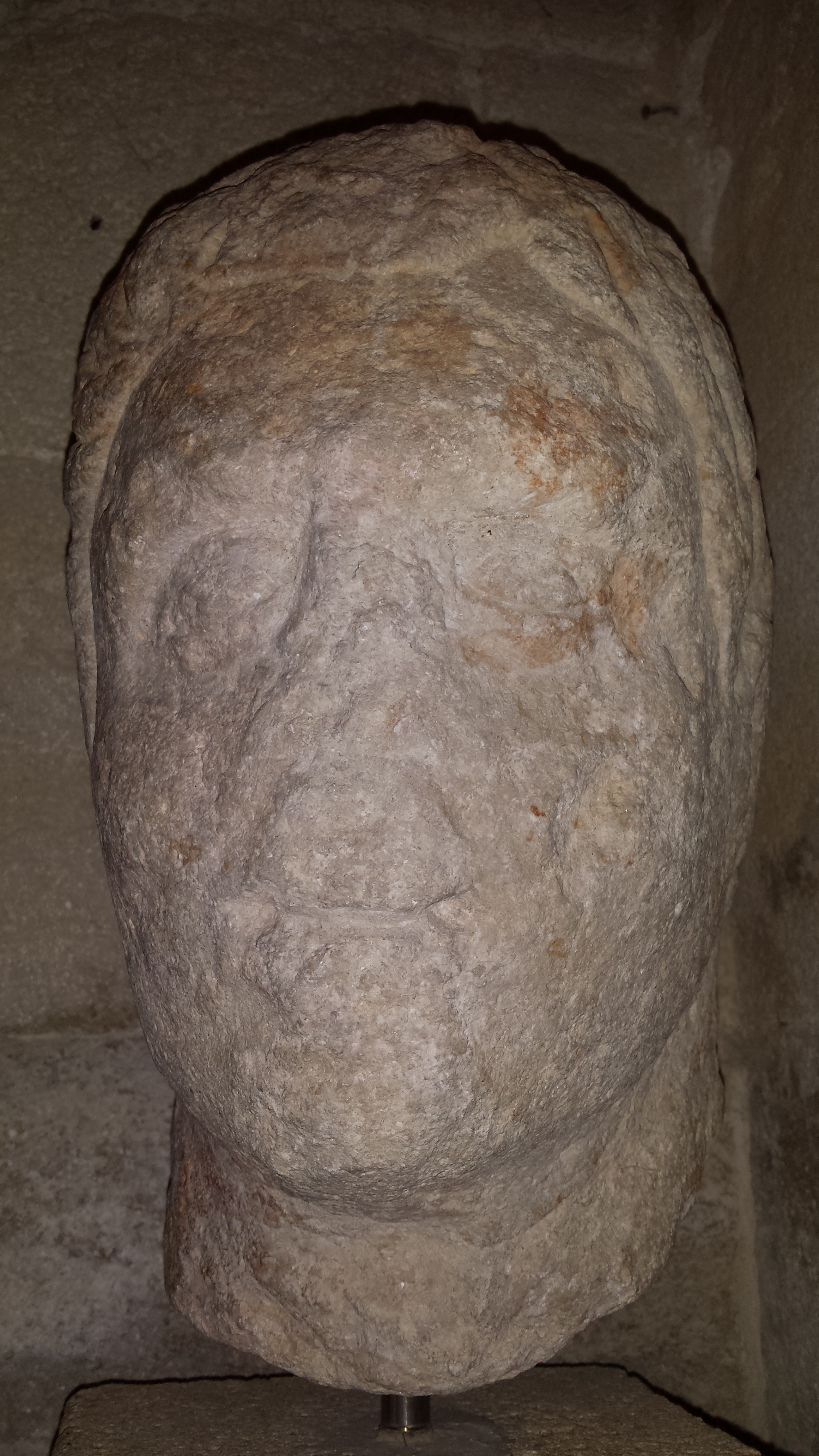 Sculpture conservée au musée lapidaire d'Avignon